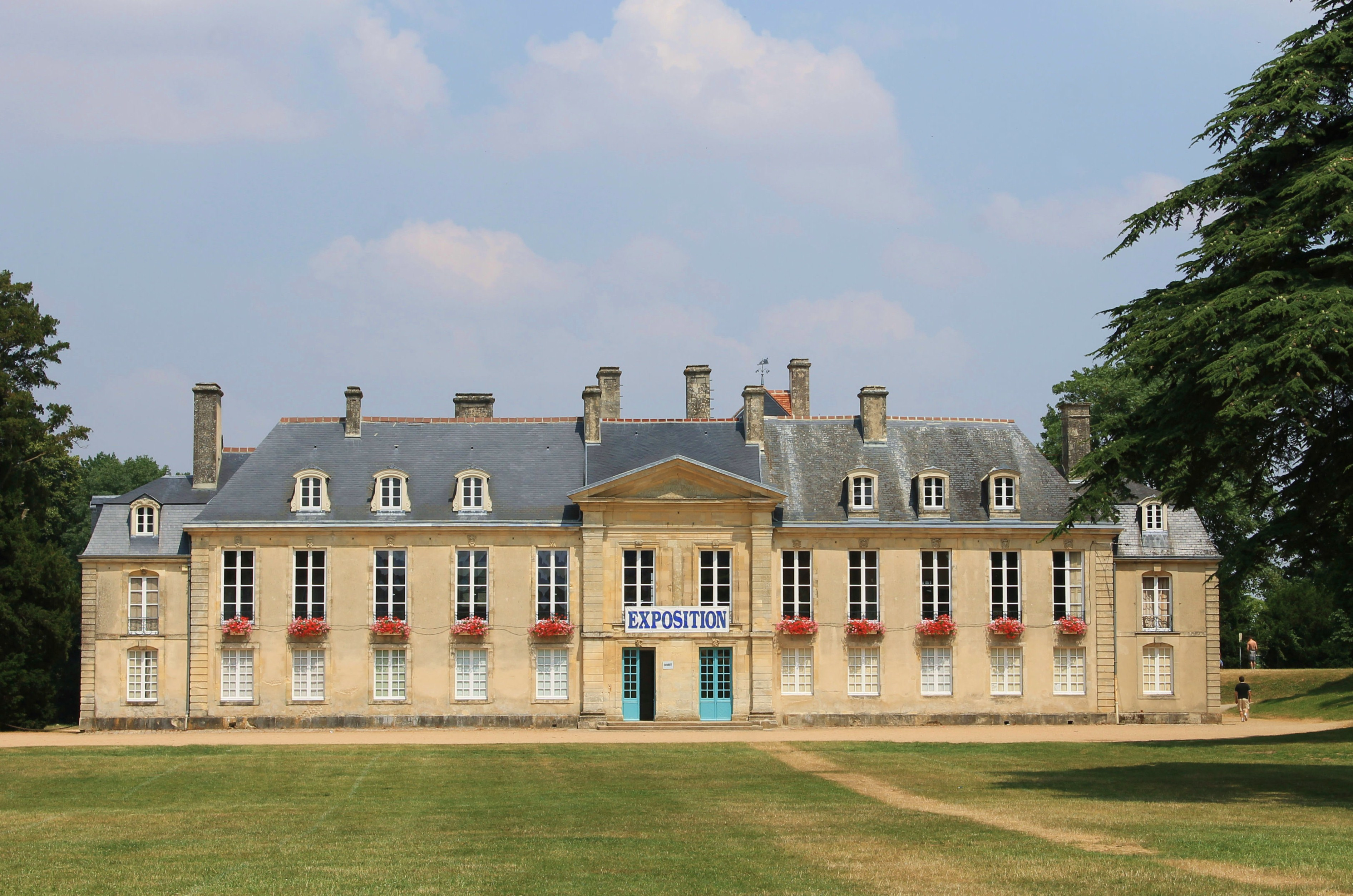 Château de la Fresnaye à Falaise (Calvados)